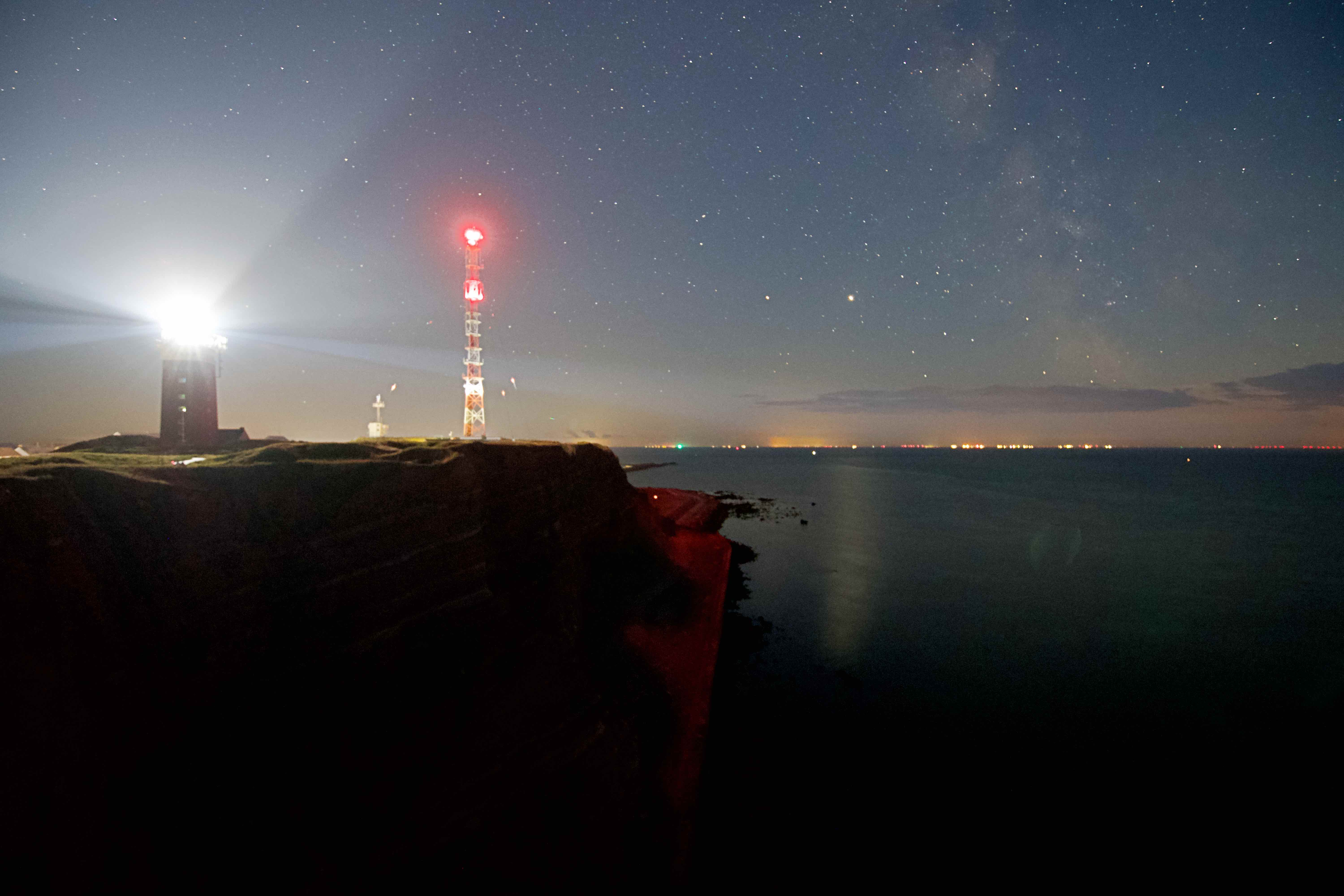 Der Helgoländer Leuchtturm und der Funkturm während der Nacht.